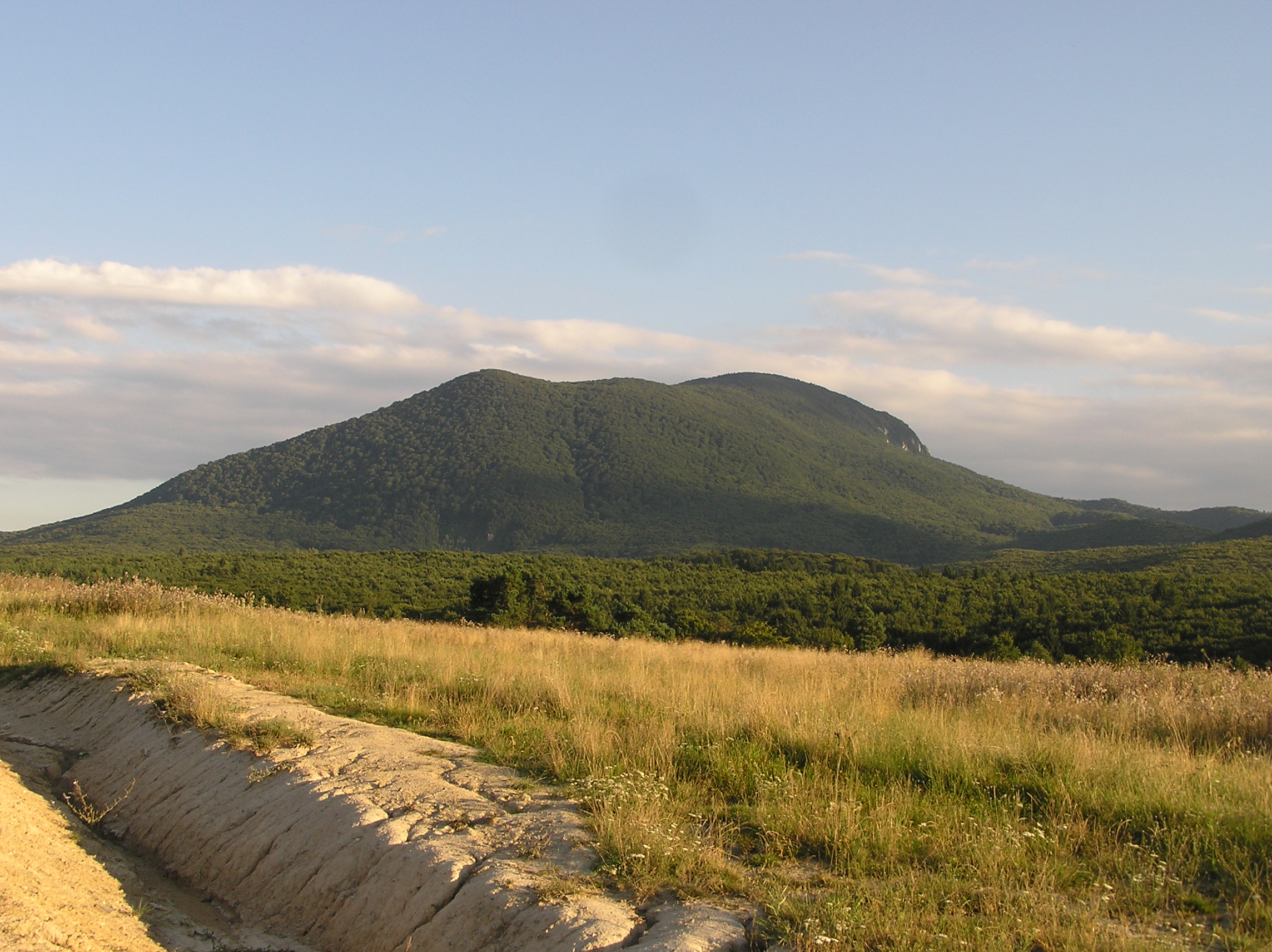 Die Nordseite des Zeidner Bergs (Măgura Codlei), in Siebenbürgen, Rumänien.